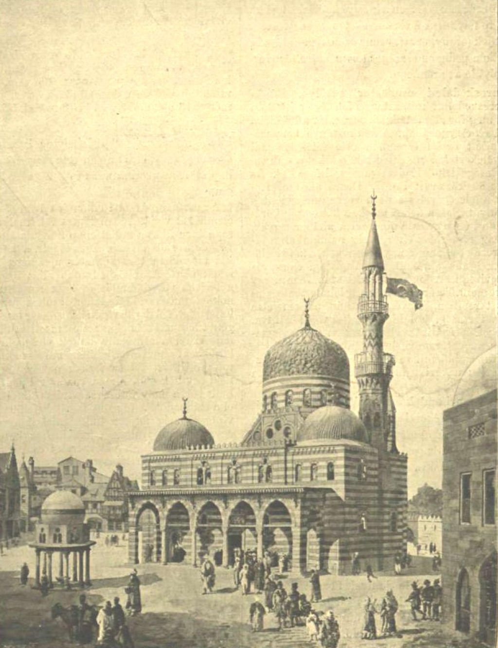 Millennium 1896